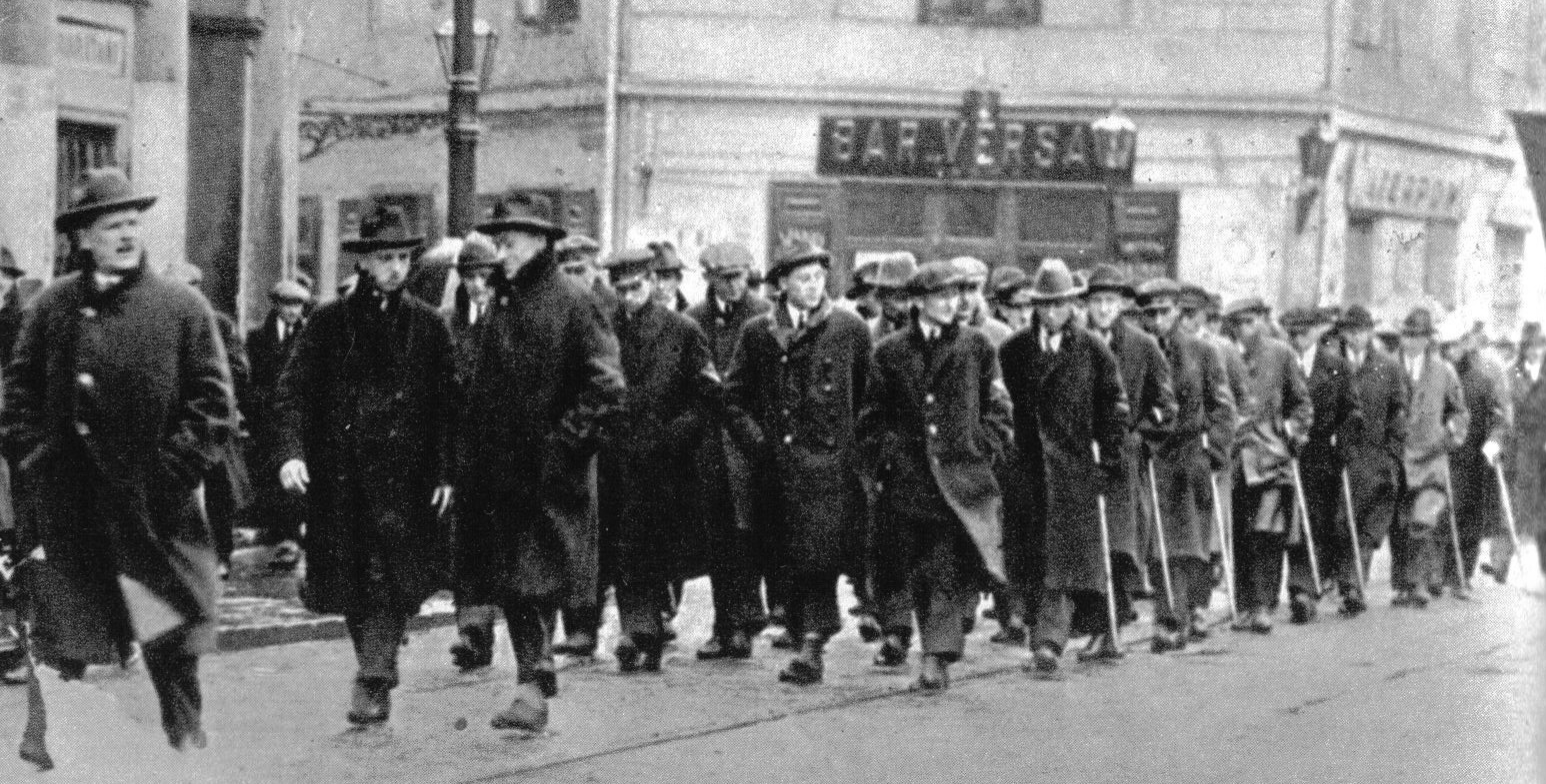 Warszawska bojówka PPS.